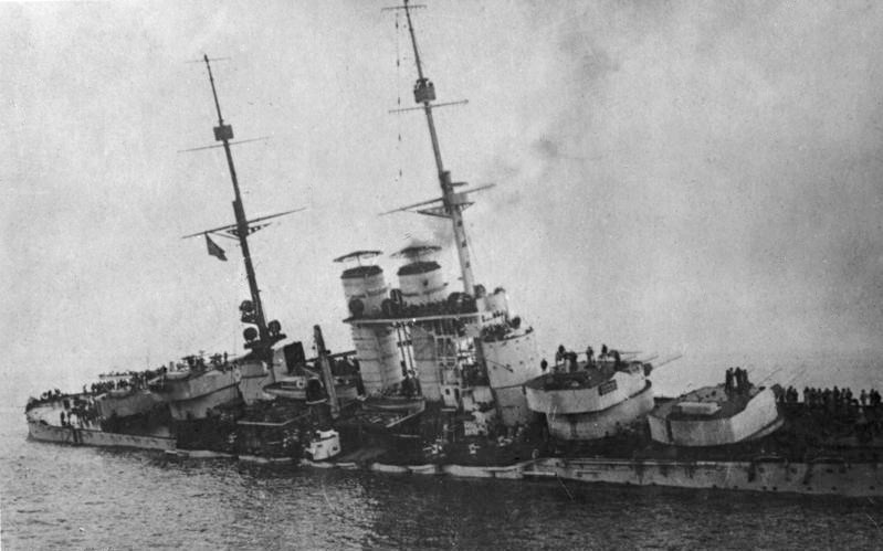 Szent István, Sinkendes Linienschiff Szent István Österreichisch Ungarisches Linienschiff Stapellauf: 17.1.1914 Sinkend